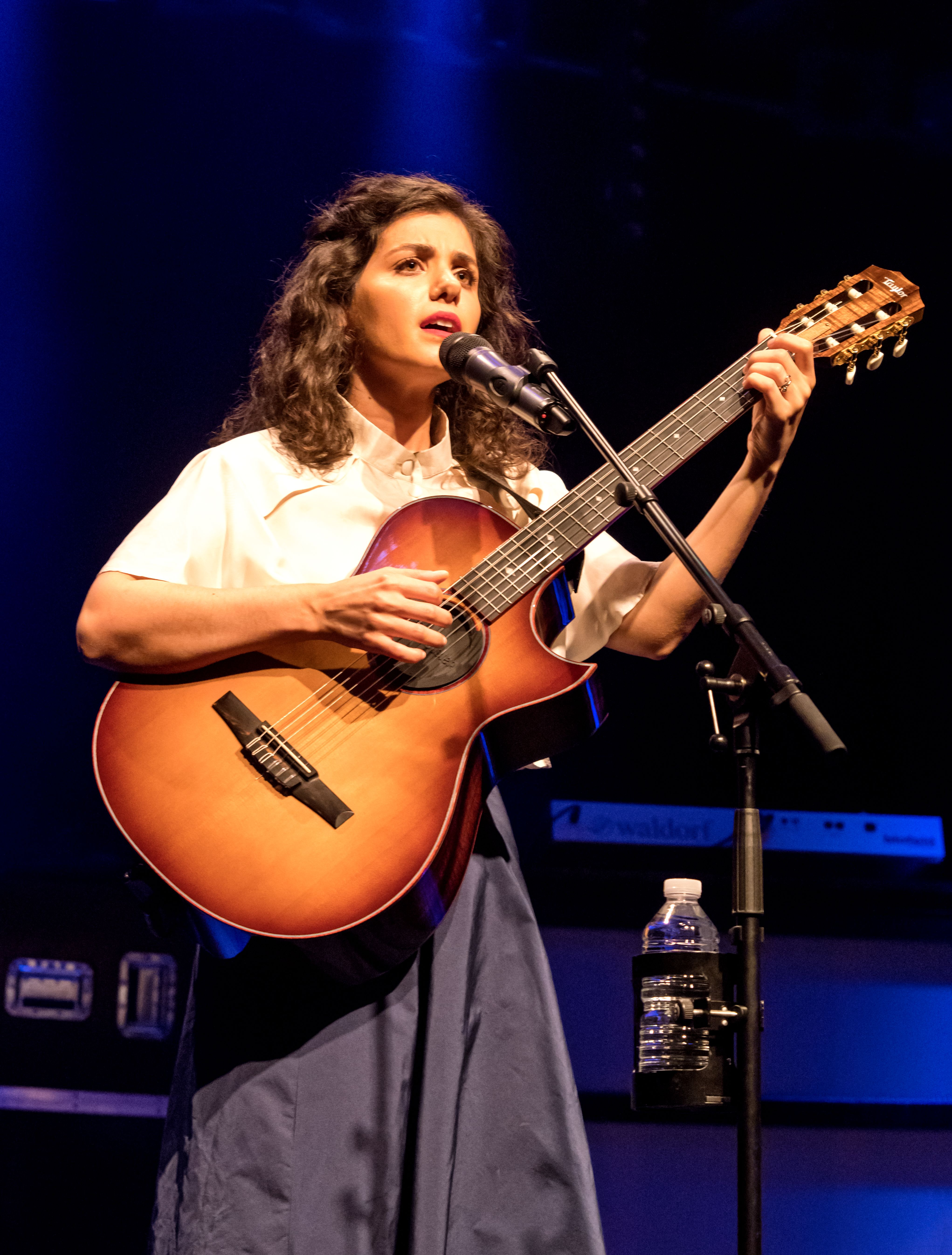 Bilder vom Zelt Musik Festival 2016 in Freiburg im Breisgau Katie Melua